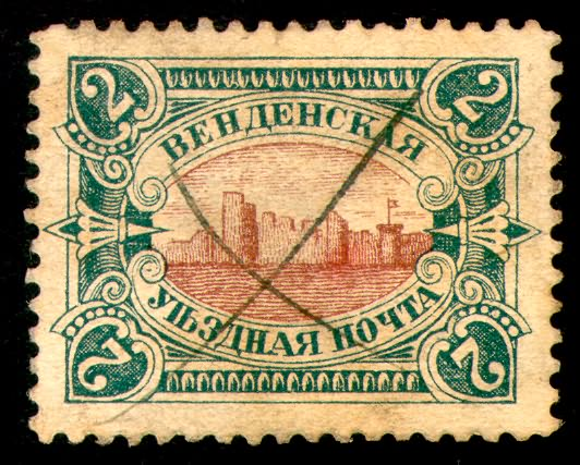 Земская марка Венденский уезд № 12a (1901 г.)